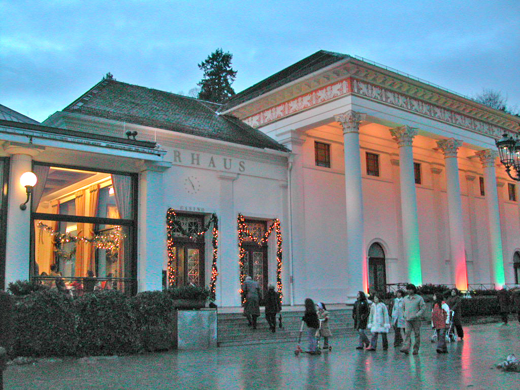 Sujet:Kurhaus zu Baden-Baden Source:Eege Foto vum User:Alexandra Lizenz:GFDL 18:50, 5 Januar 2006 Cornischong 1024x768 (766273 Byte) (*Sujet:Kurhaus zu Baden-Baden *Source:Eege Foto vum :lb:User:Alexandra *Lizenz:GFDL)